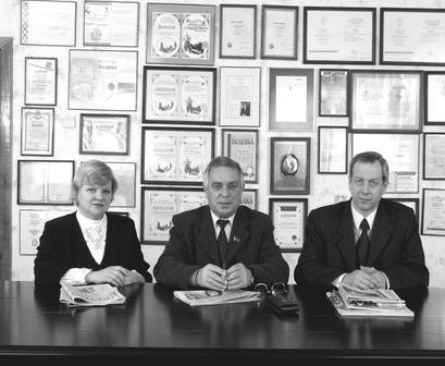 Вони починали Волинське телебачення: тодішній голова облтелерадіокомітету Святослав Пирожко, перший головний редактор Головної редакції телебачення Ольга Куліш і начальник виробничо-технічного відділу телебачення Микола Гловацький (1993)